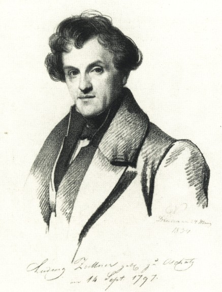 Porträt des Lithographen Ludwig Zoellner